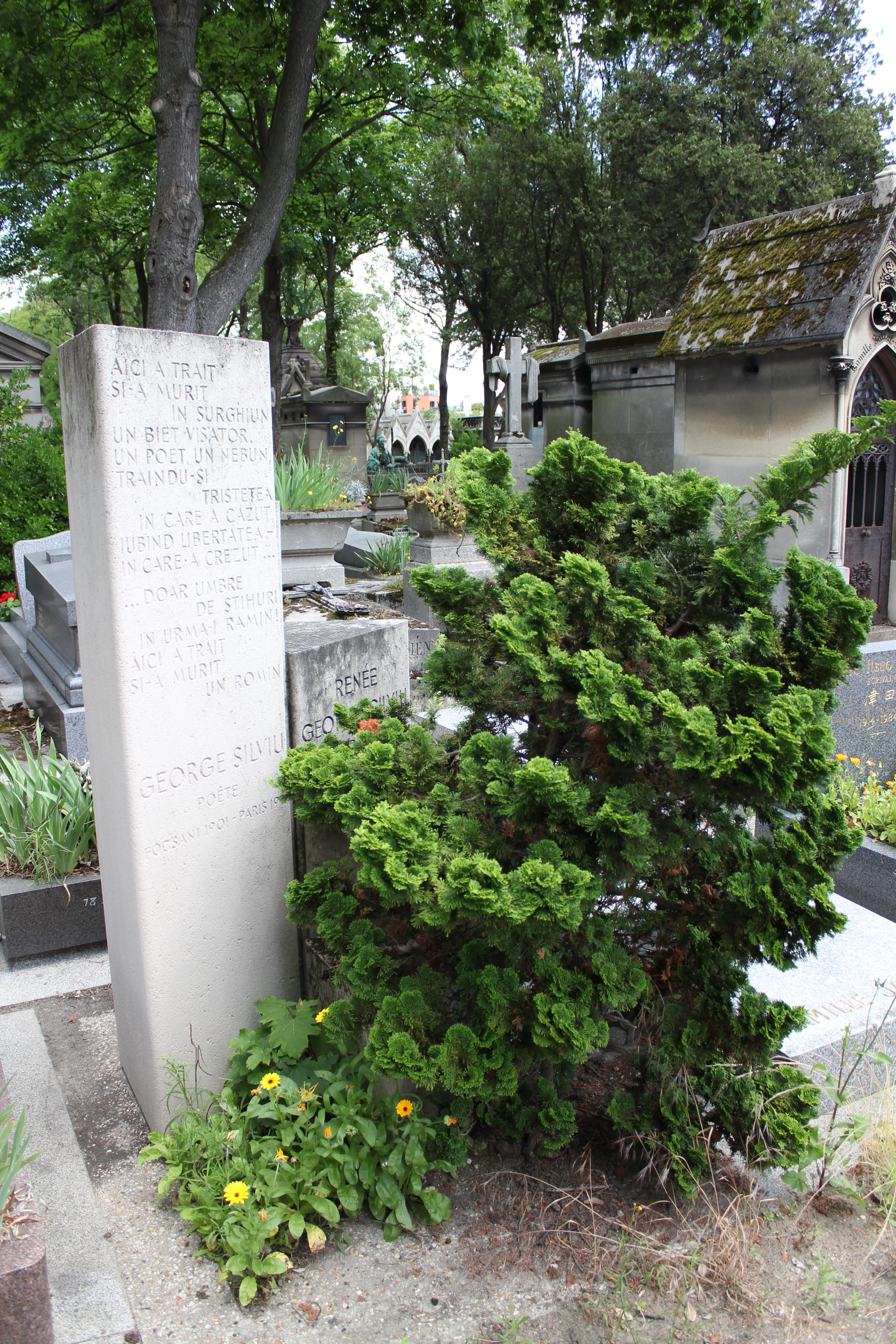 Sépulture de George Silviu (1901-1971), poète, metteur en scène, traducteur et avocat roumain ; Renée George Silviu (1913-1988), metteur en scène.détail face avant